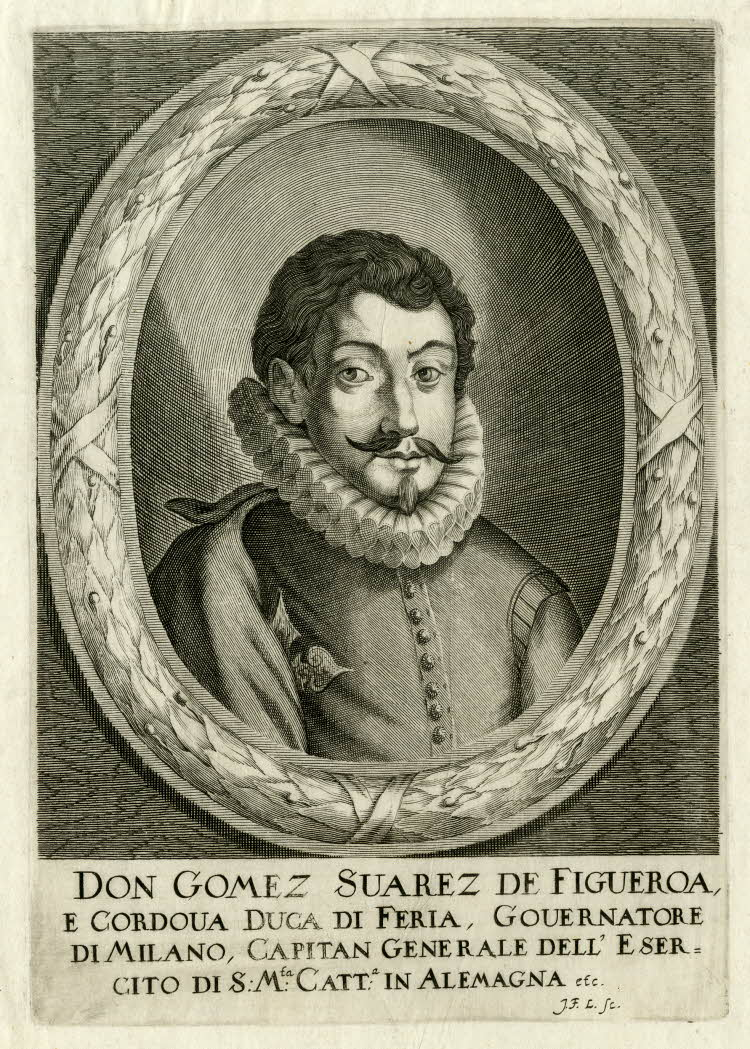 Retrato de Gómez Suárez de Figueroa y Córdoba, duque de Feria, gobernador de Milán, Capitán General del ejército de S. M. Católica en Alemania. Grabado firmado JF. L. fc (Johann Friedrich Leonart). The British Museum